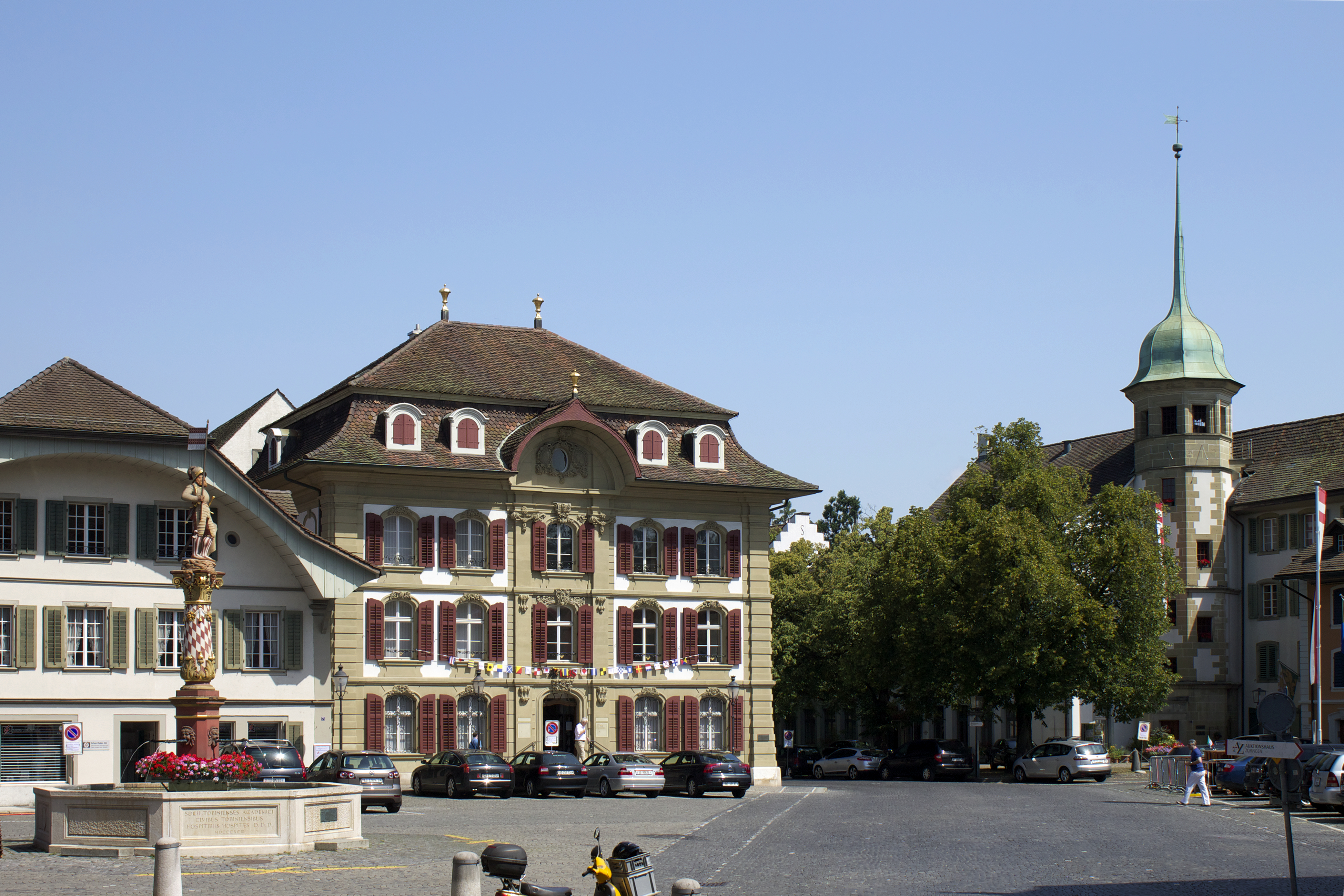 Der Niklaus-Thut-Platz in Zofingen, mit Niklaus-Thut-Brunnen und Neuhaus (Bildmitte). Rechts ist der Treppenturm der Stiftsschaffnerei.